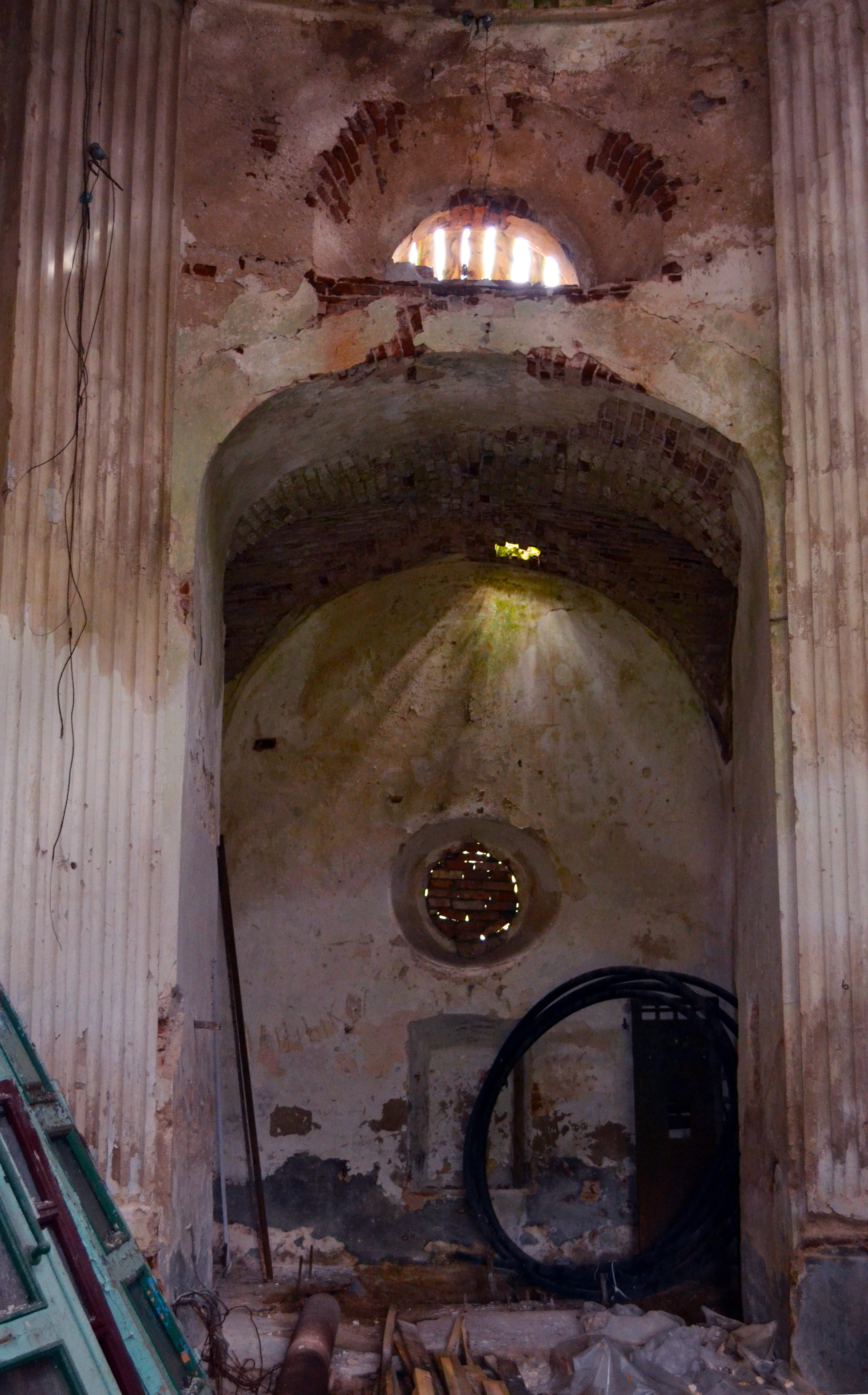 Беларуская (тарашкевіца): Кальвінскі збор, парк на былой сядзібе «Кухцічы» (мяст. Першамайск, Узьдзенскі раён) This is a photo of Belarusian heritage monument. Reference number: 612Г000628 ( WLM)